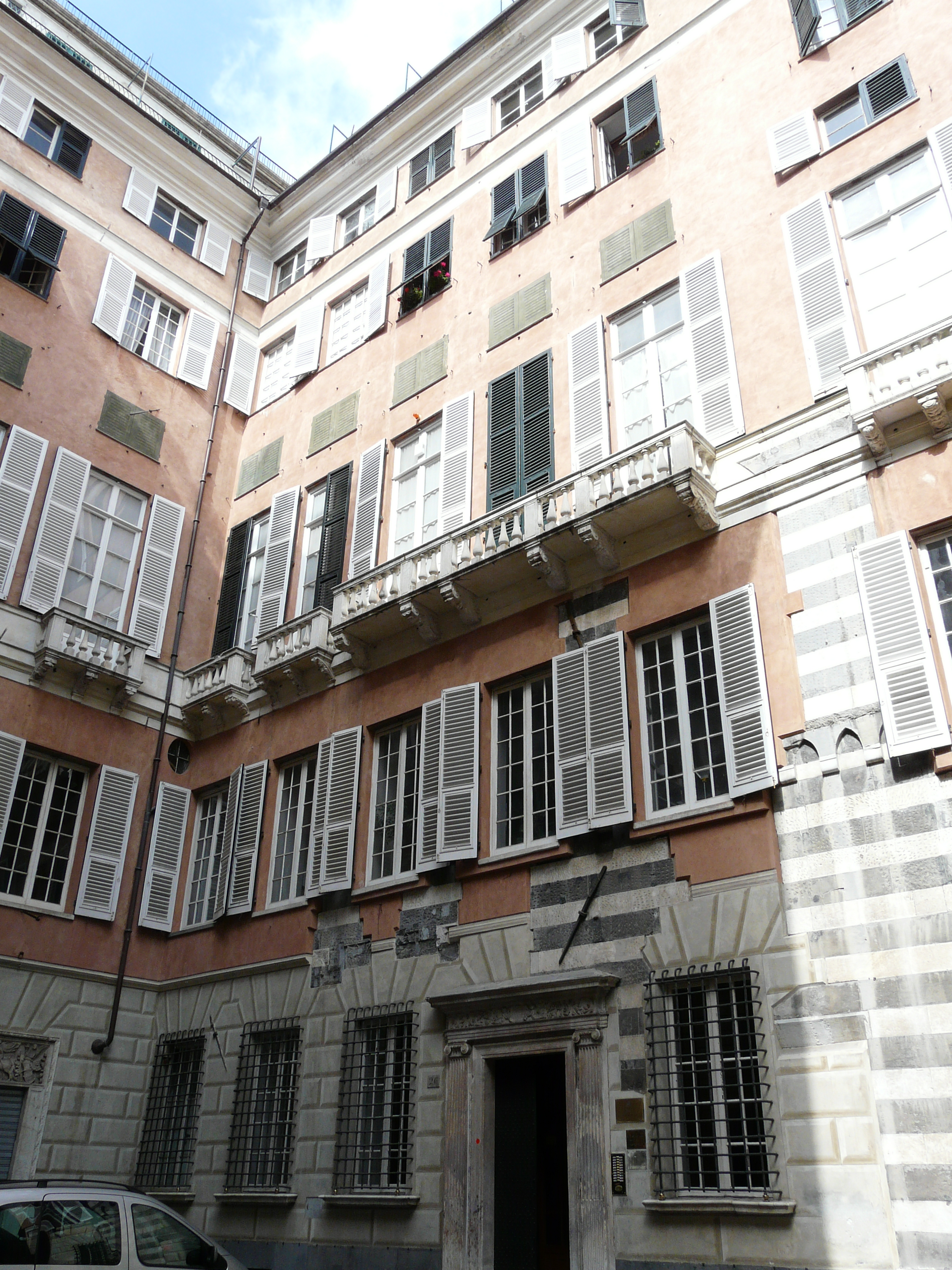 Palazzo Cattaneo Della Volta, Genova, Liguria, Italia